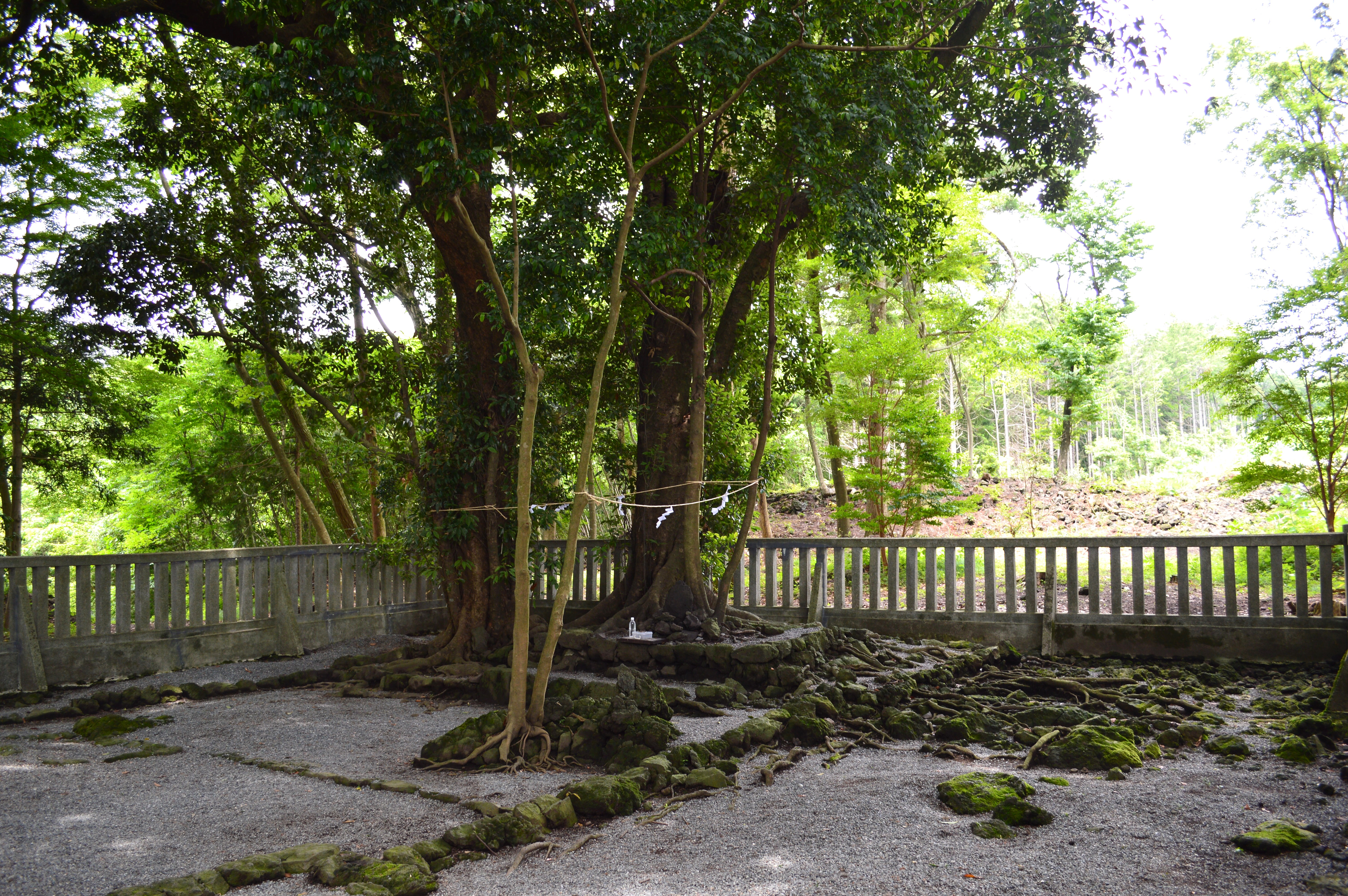 山宮浅間神社 祭祀遺跡 (右)